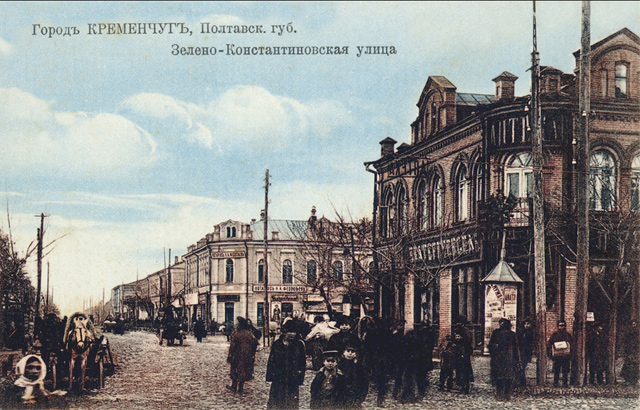 Postcards of old Kremenchuk. Вулиця Зелено-Костянтинівська, тепер Пролетарська.